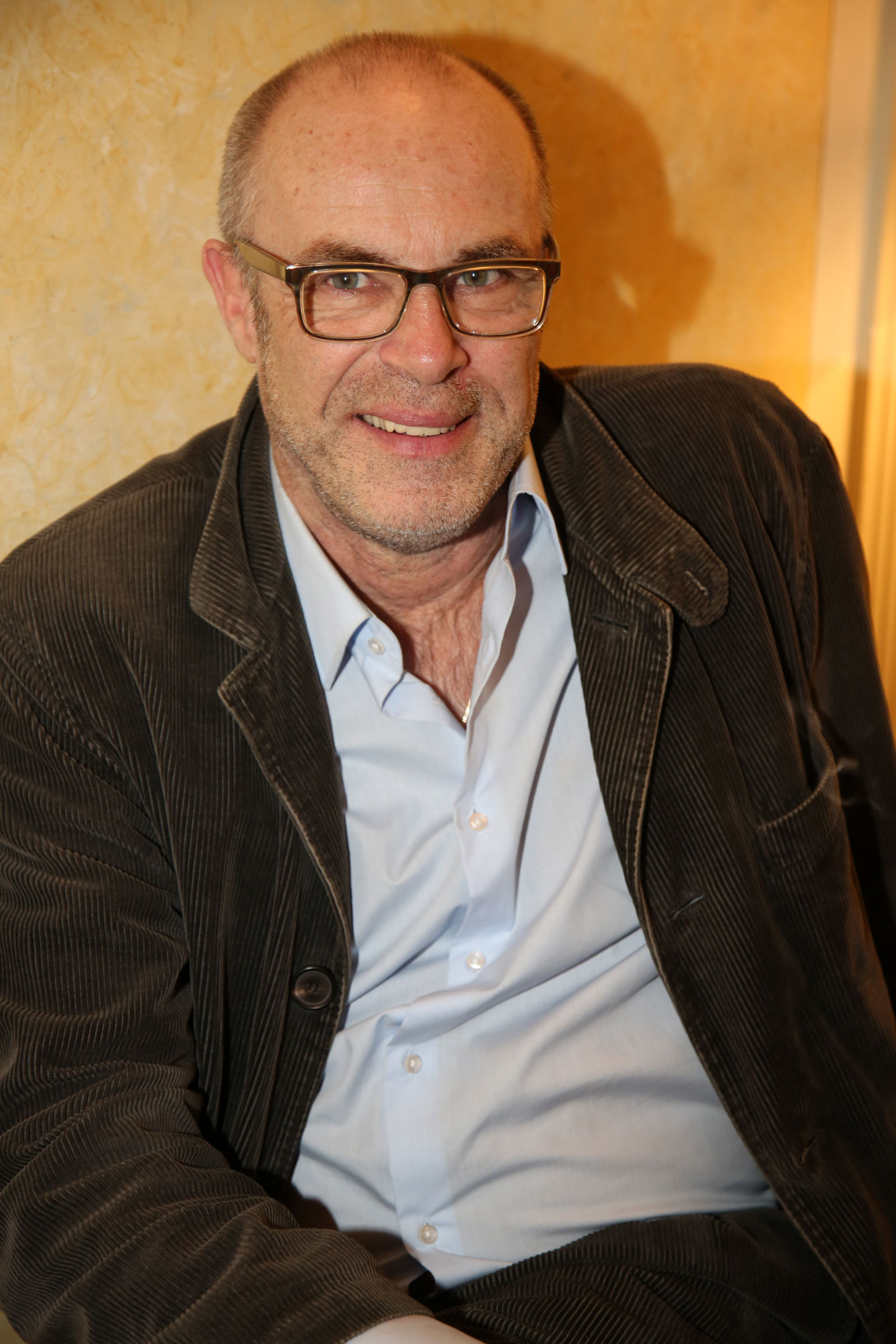 Kremer_Peter-9372